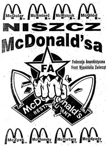 Zdjęcie ze strony skłotu Rozbrat. Za zgodą kolektywu.